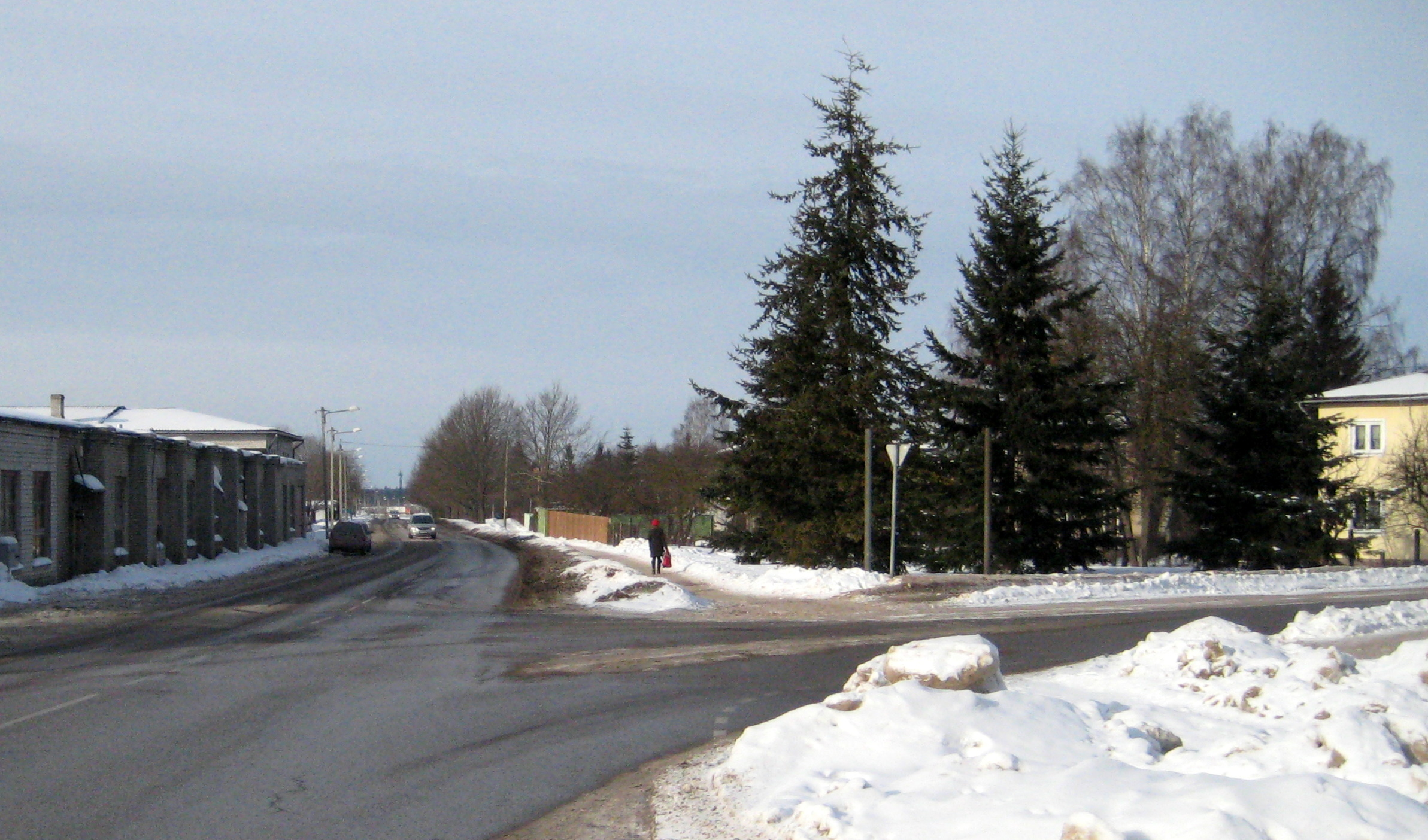 Vaksali tänav, paremale keerab Hurda tänav, Tartu